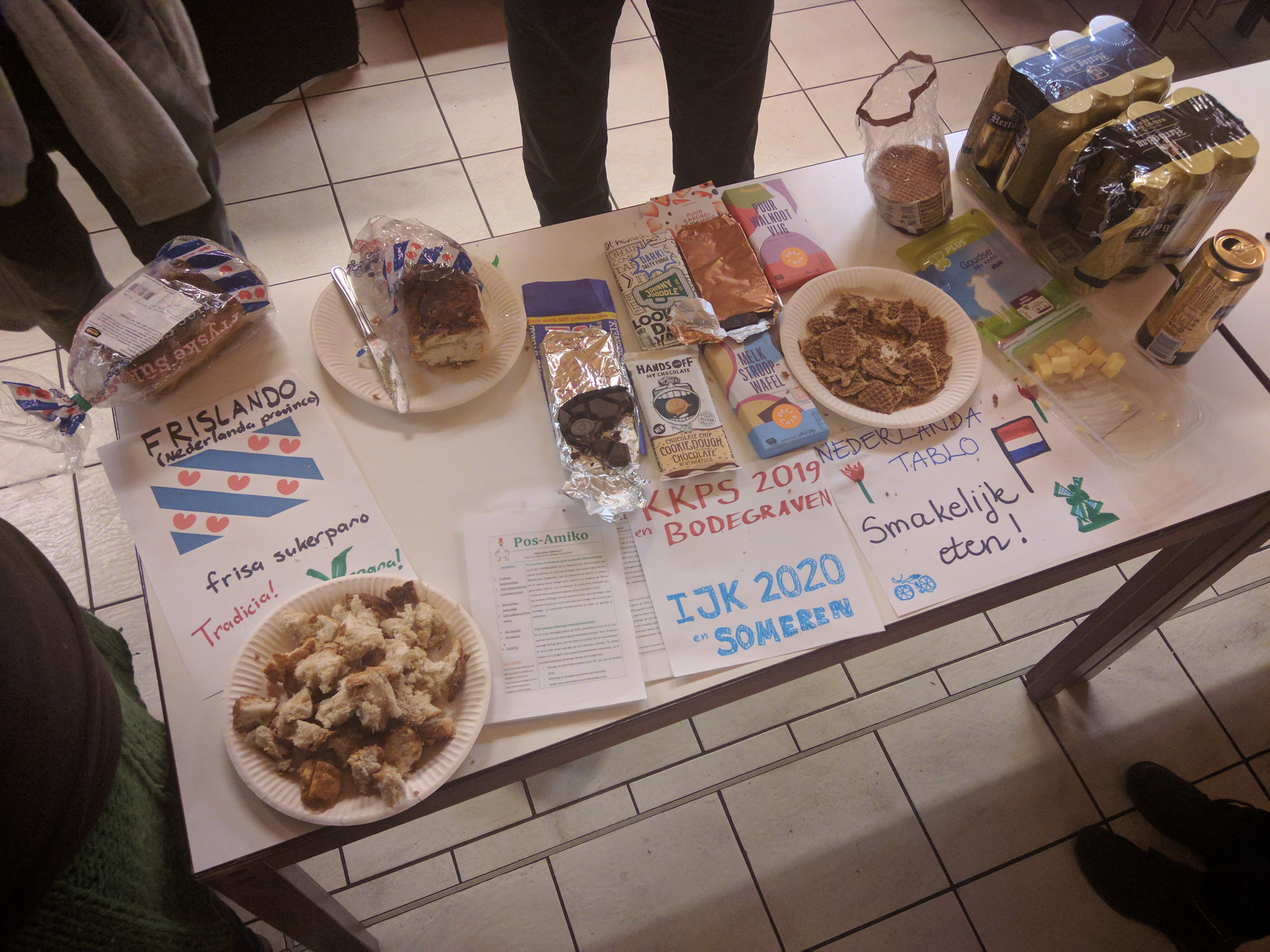 Trinkomanĝa nokto dum JES 2018-2019. Ĉi tiu tablo reprezentas Nederlandon.